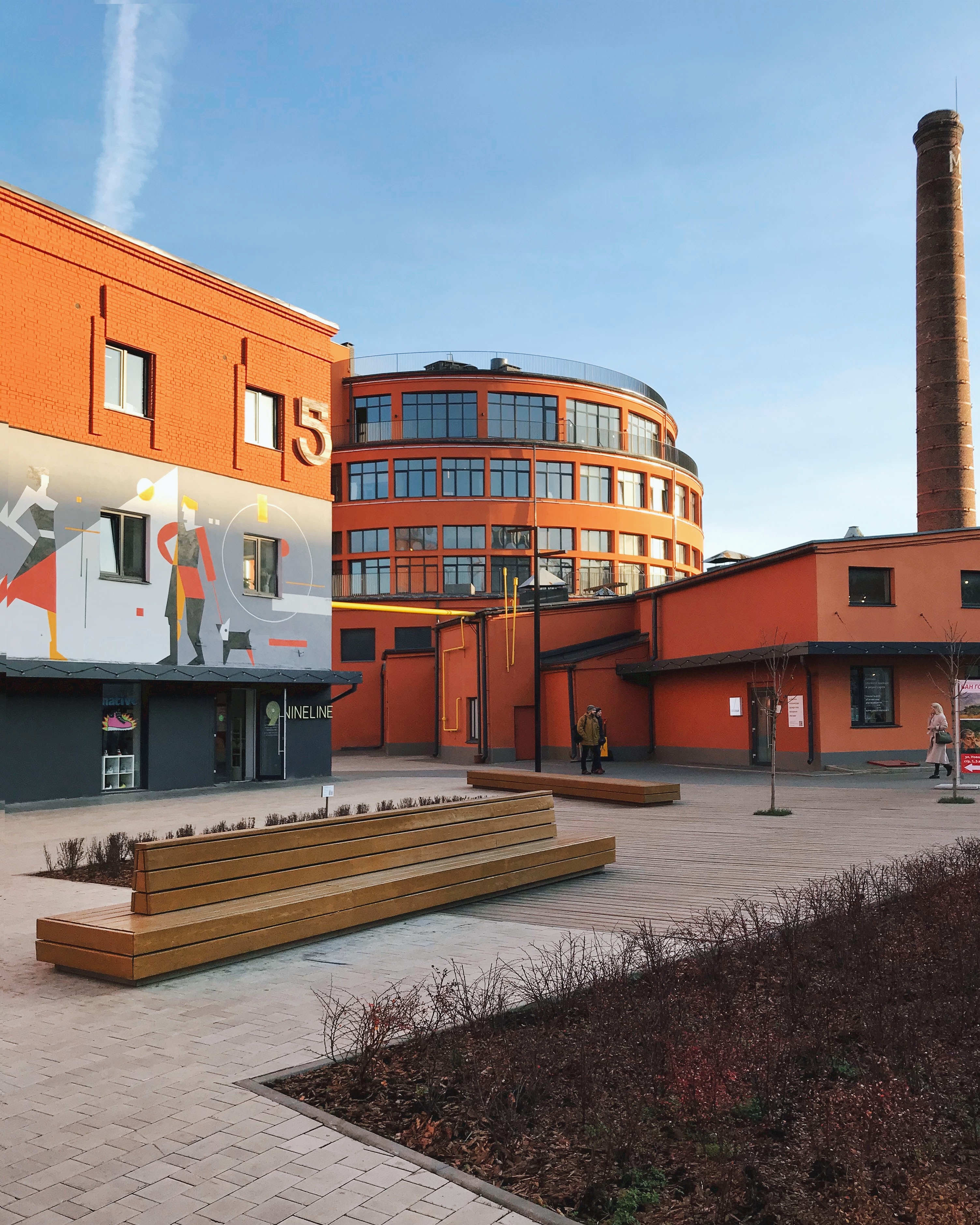 Общий вид на пространство "Хлебозавод".